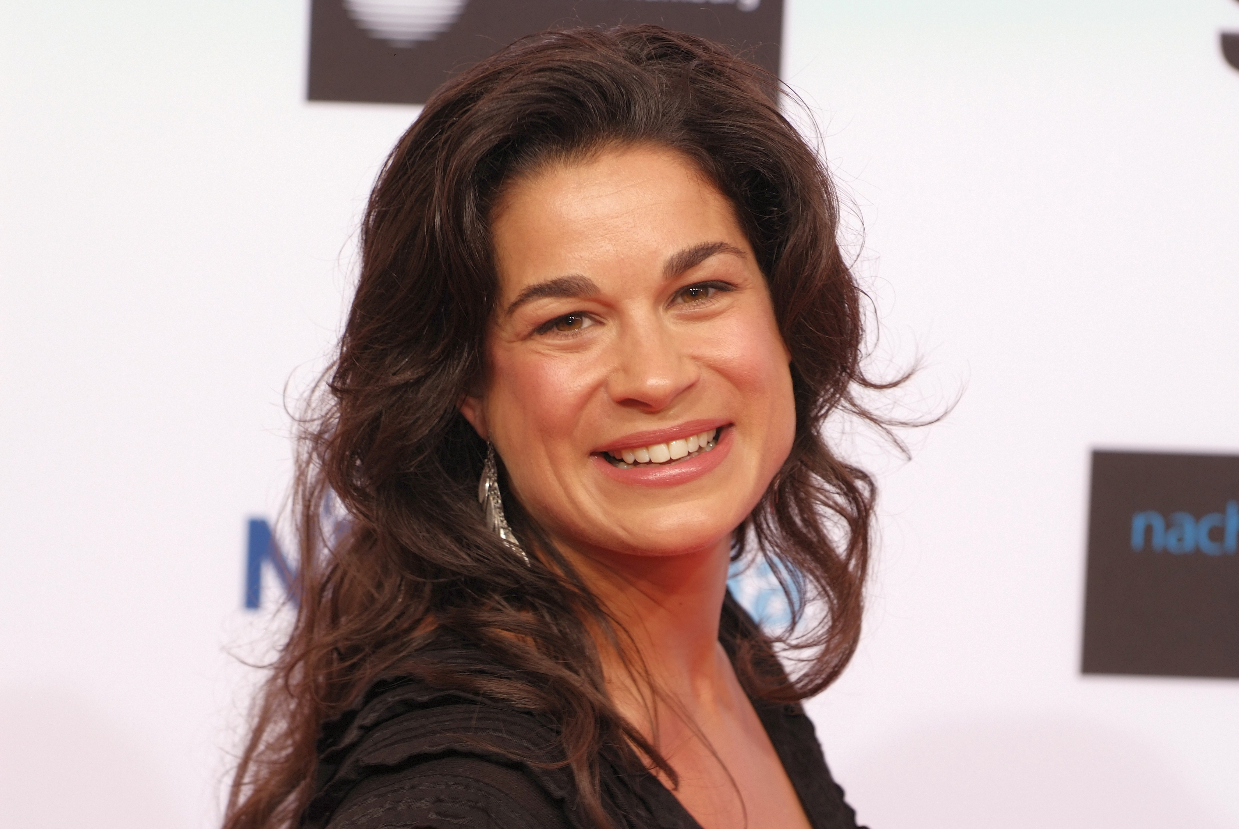 Studio Hamburg Nachwuchspreis 2012